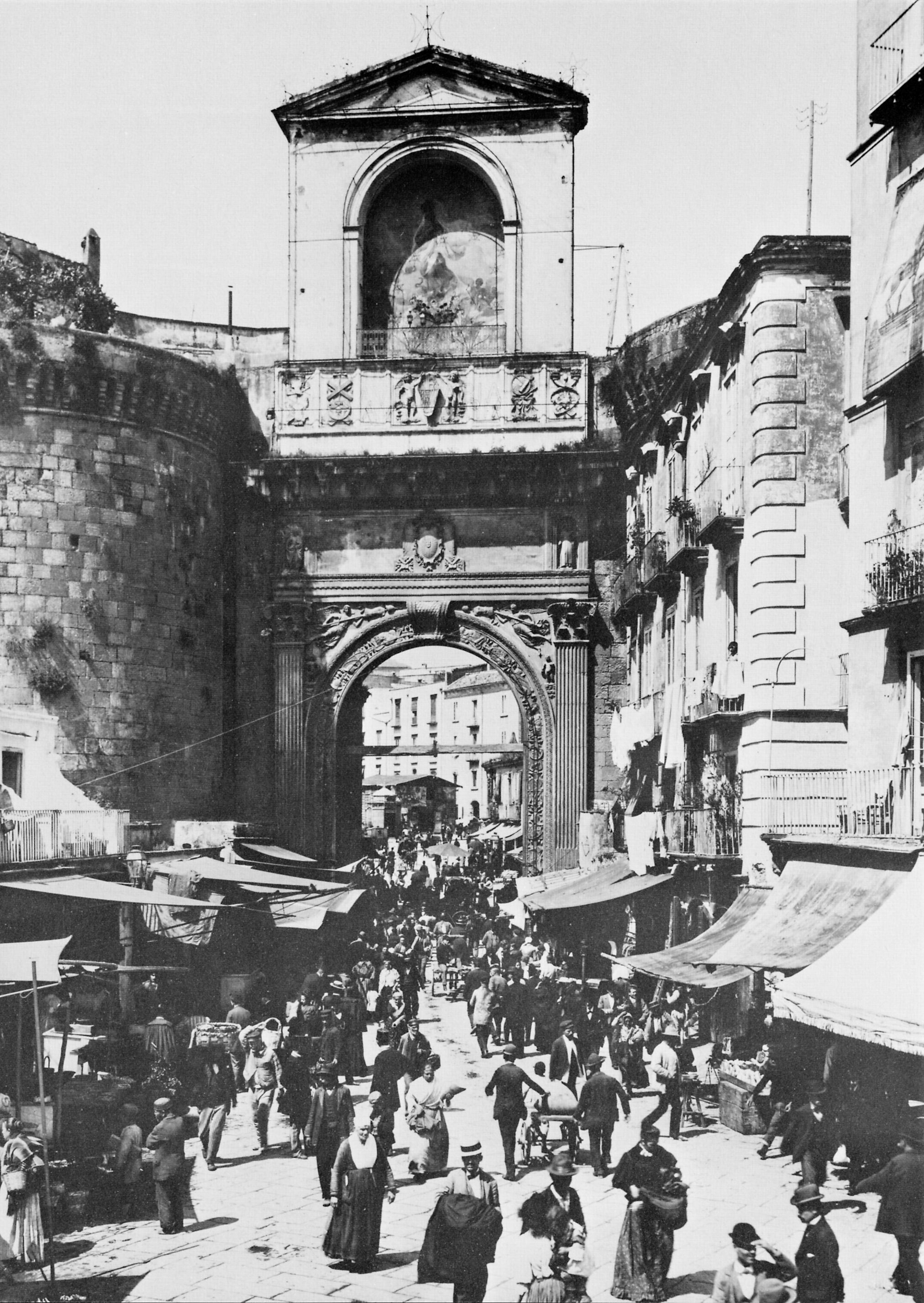 Gebrüder Alinari: Das Capuana Tor in Napoli